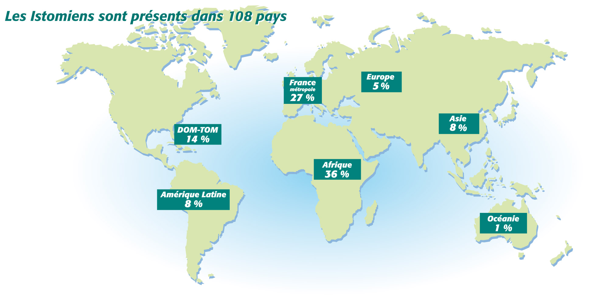 Cette carte permet de distinguer la répartition géographique des jeunes diplômés de l'ISTOM.